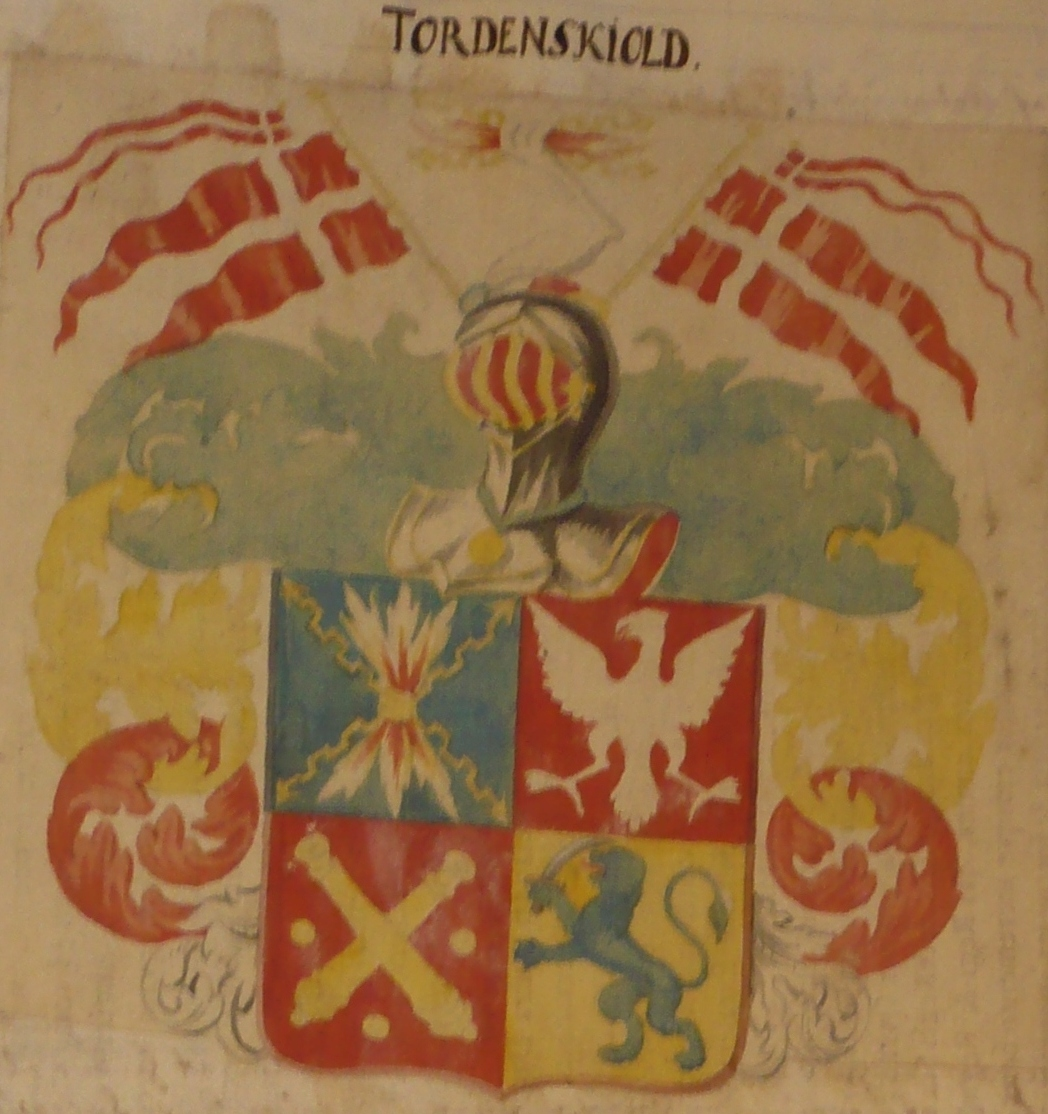 Våpenskoldet til Peter Wessel Tordenskjold